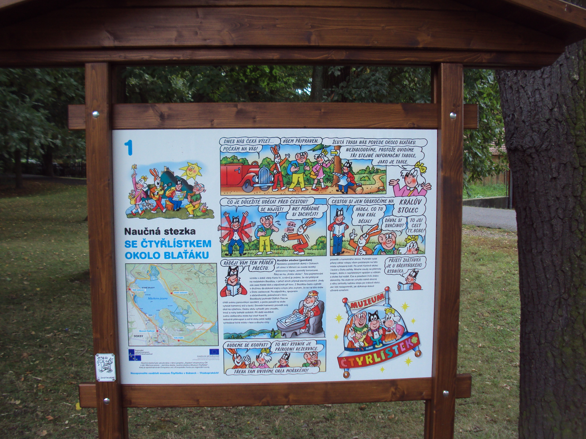 Naučná stezka Čtyřlístek, zastavení první